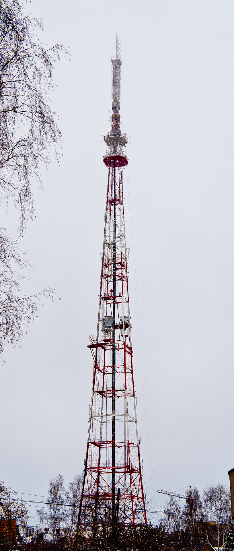 Телевизонная башня в Нижнем Новгороде.